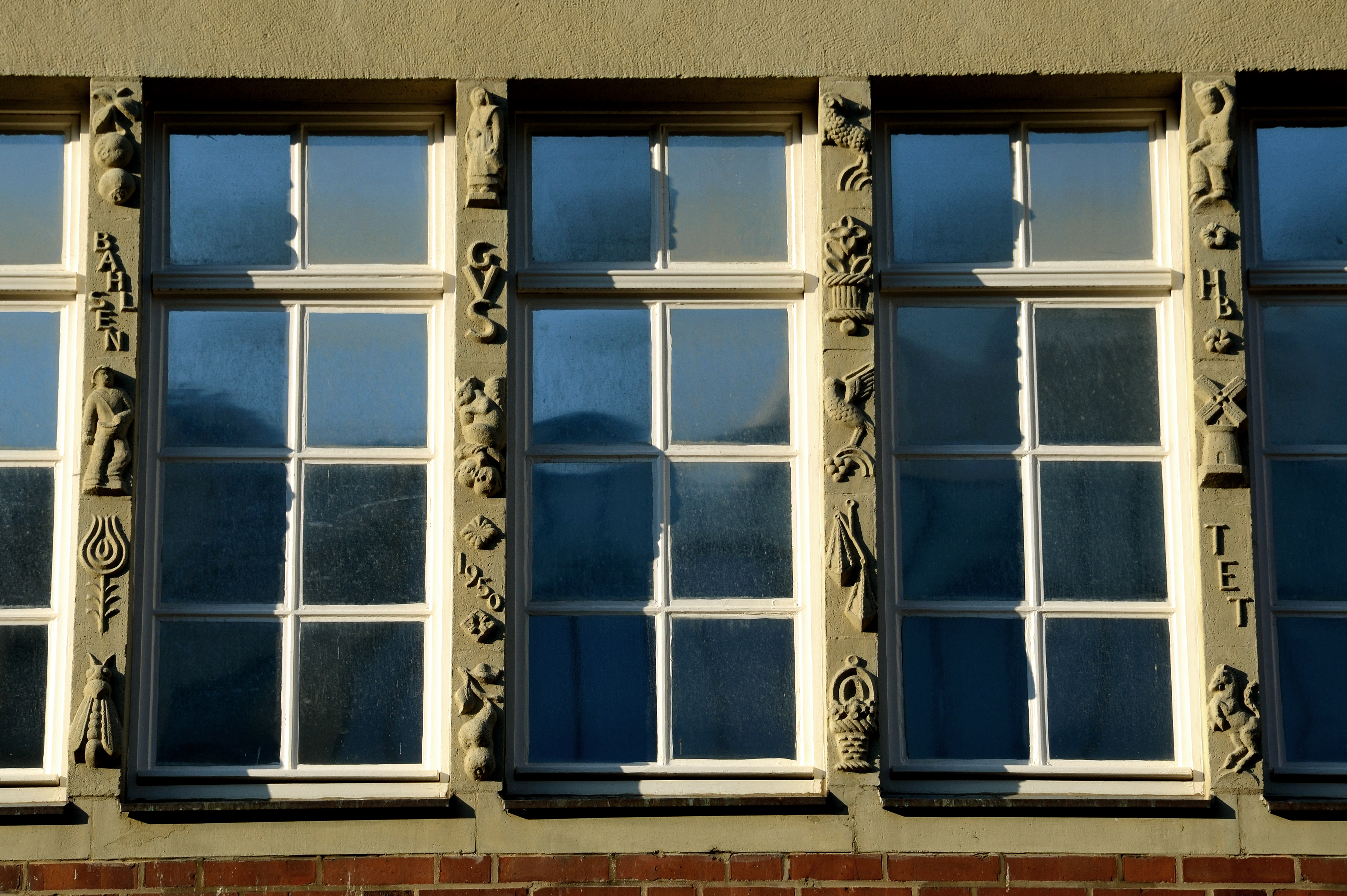 Gesehen am 27.August 2014 ...